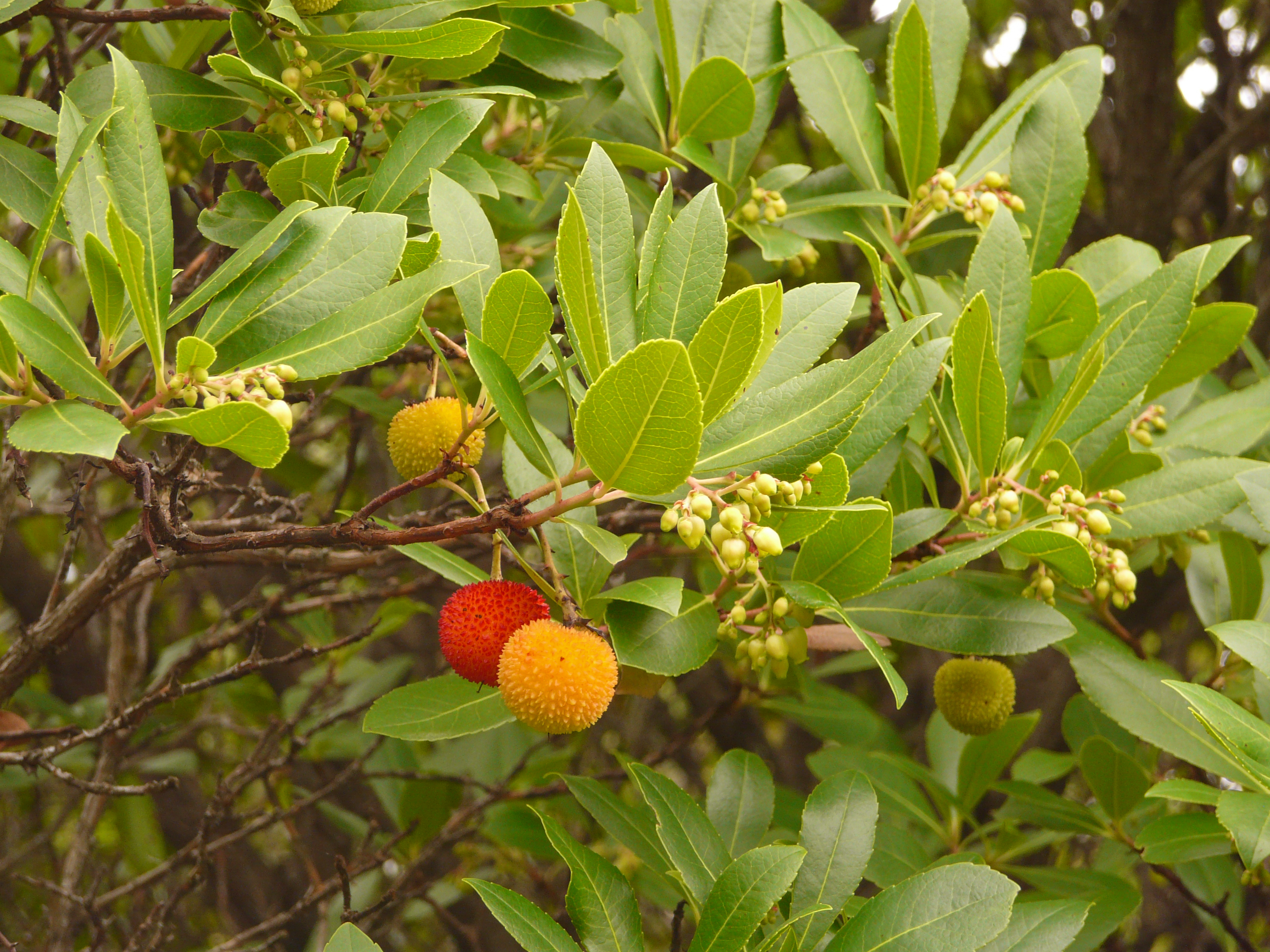 Westlicher Erdbeerbaum am Monte Moro, Gallura, Sardinien